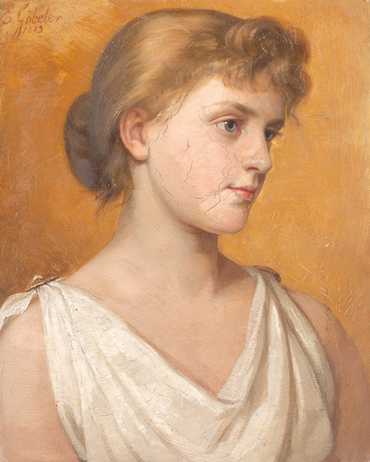 Bildnis einer jungen Griechin